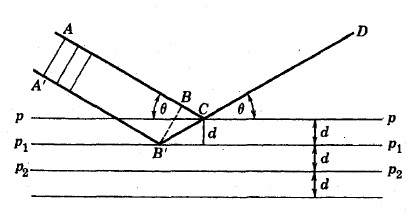 Espalhamentos